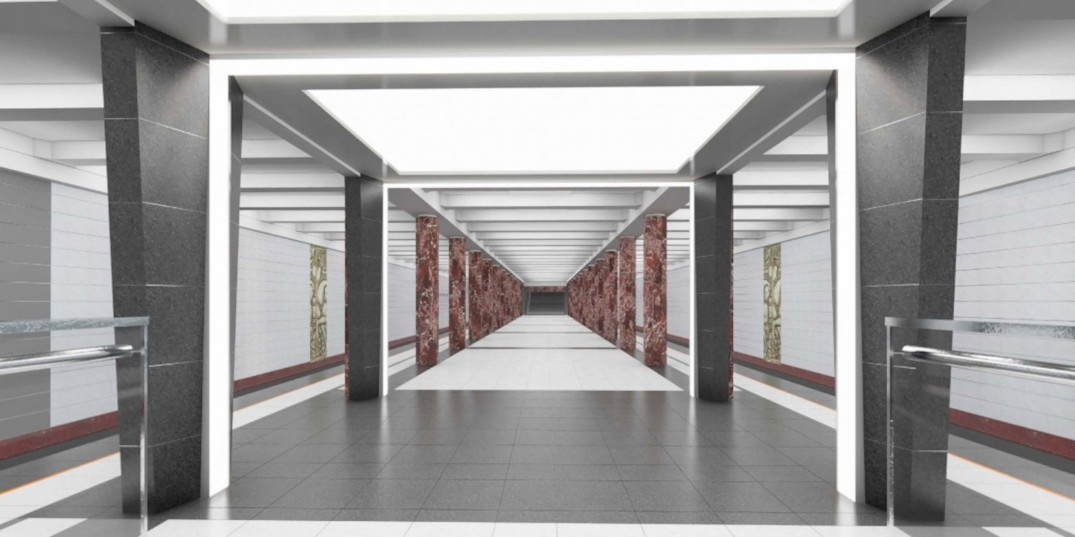 Проект реконструкции станции